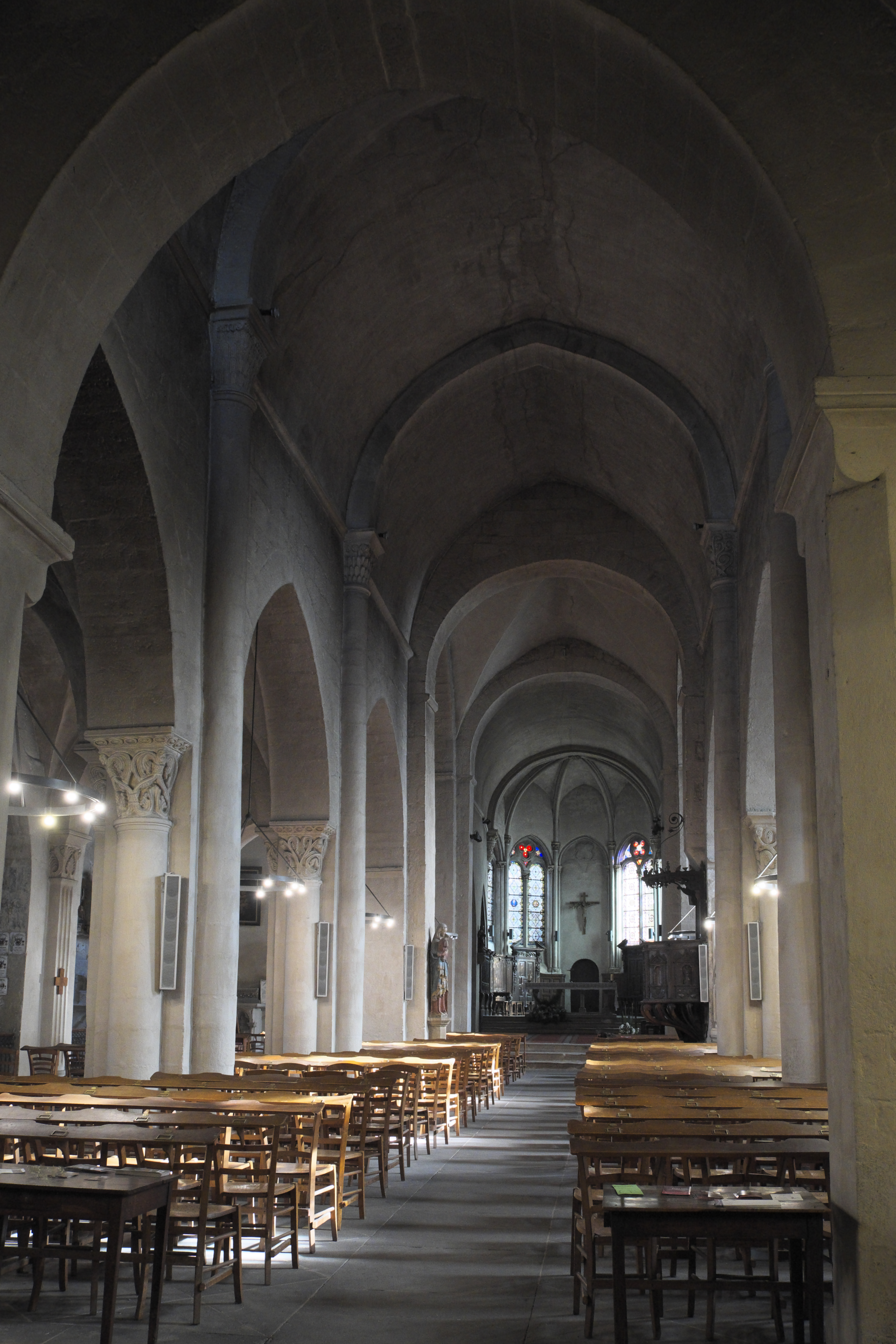 Katholische Kirche Saint-Pierre in Yzeure im Département Allier (Auvergne-Rhône-Alpes/Frankreich), südliches Seitenschiff